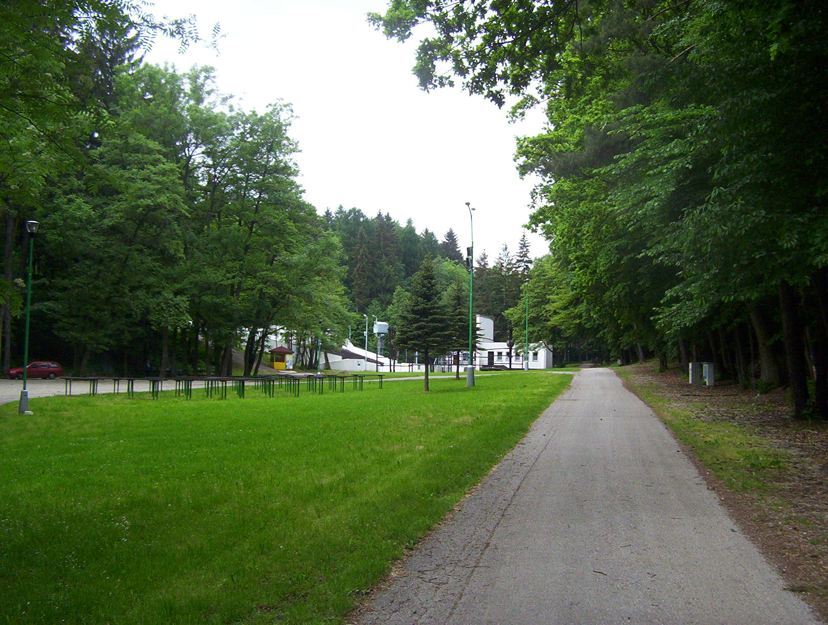 PKO Trnovce, Myjava